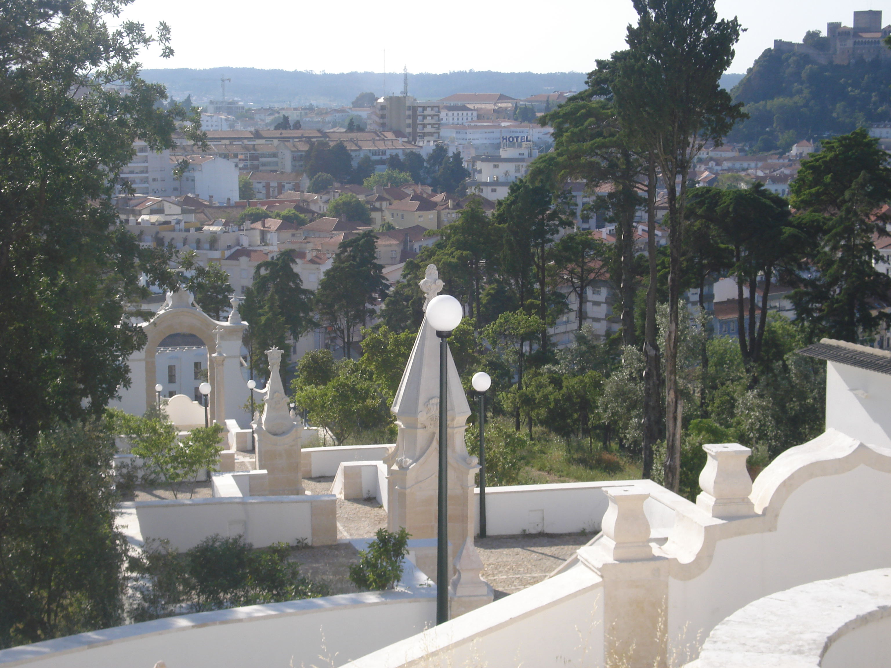 Escadaria barroca da capela de Nossa Senhora da Encarnação (Leiria)